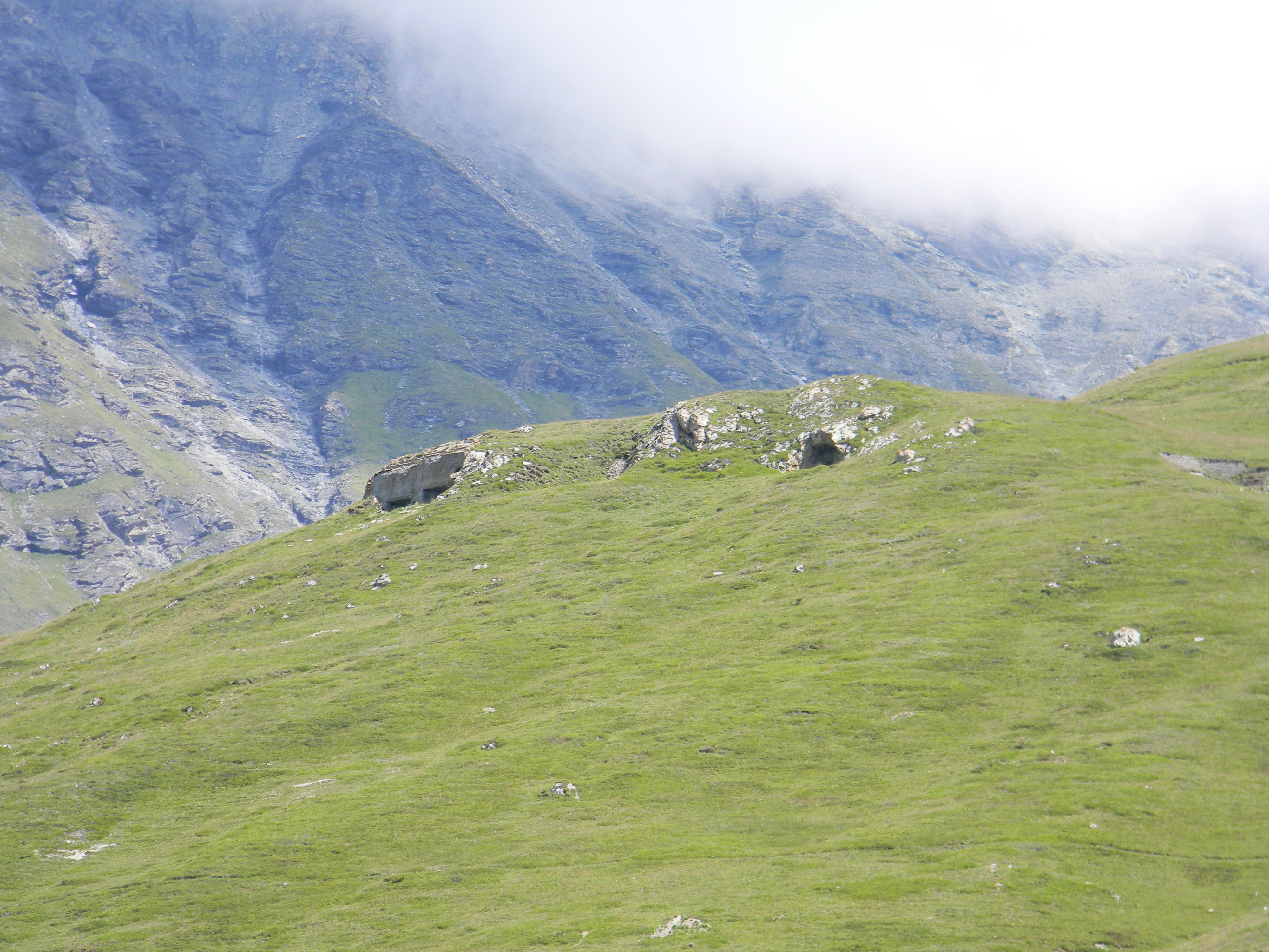 Bunker sur le Mont Cenis.